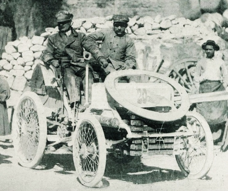 Lemaître, vainqueur sur Peugeot 17 hp en mars 1899 de Nice-La Castellane-Nice, du mile de Nice, et à la côte de La Turbie - La Vie au Grand Air du 1er avril 1899